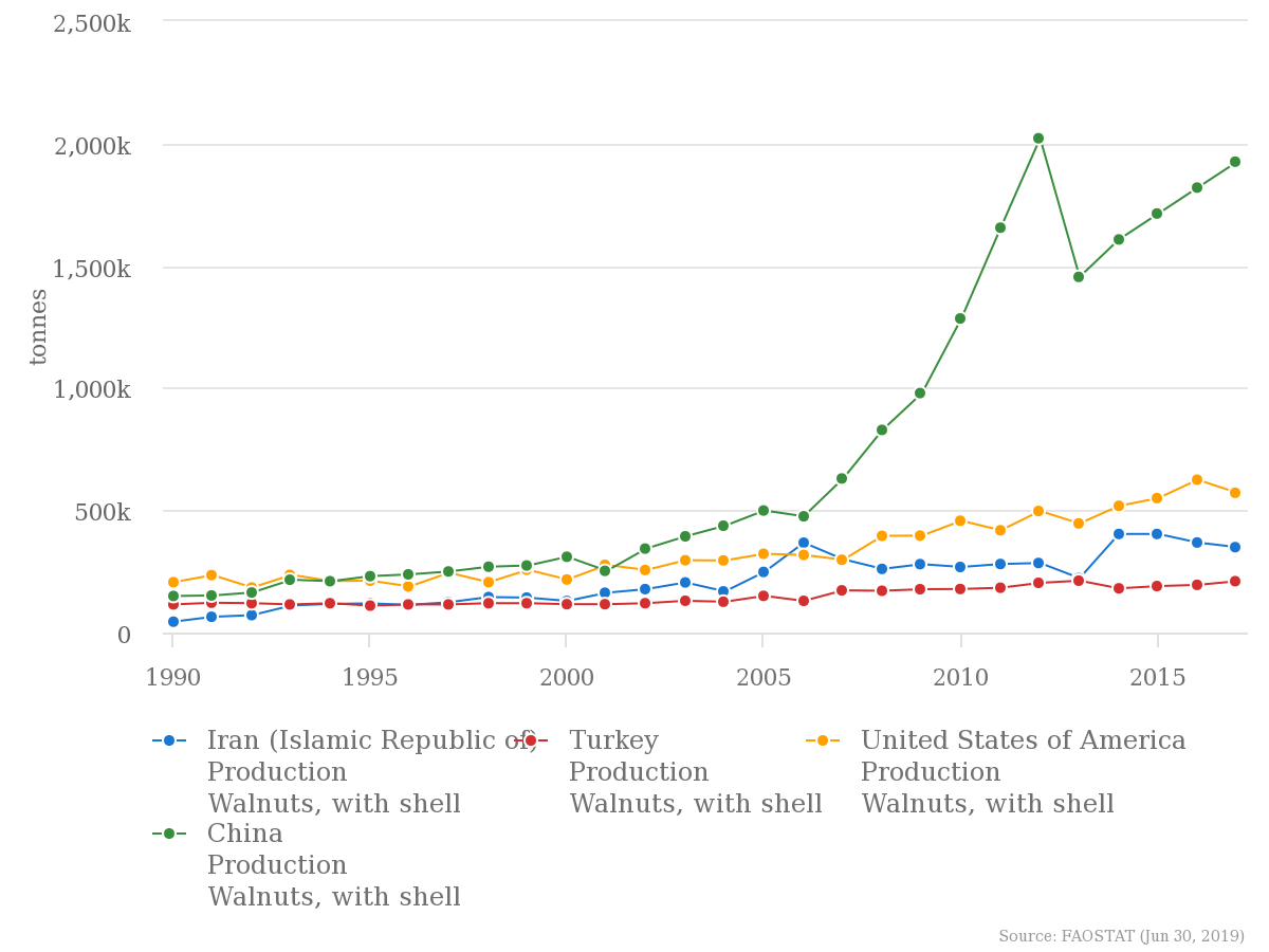 گردو